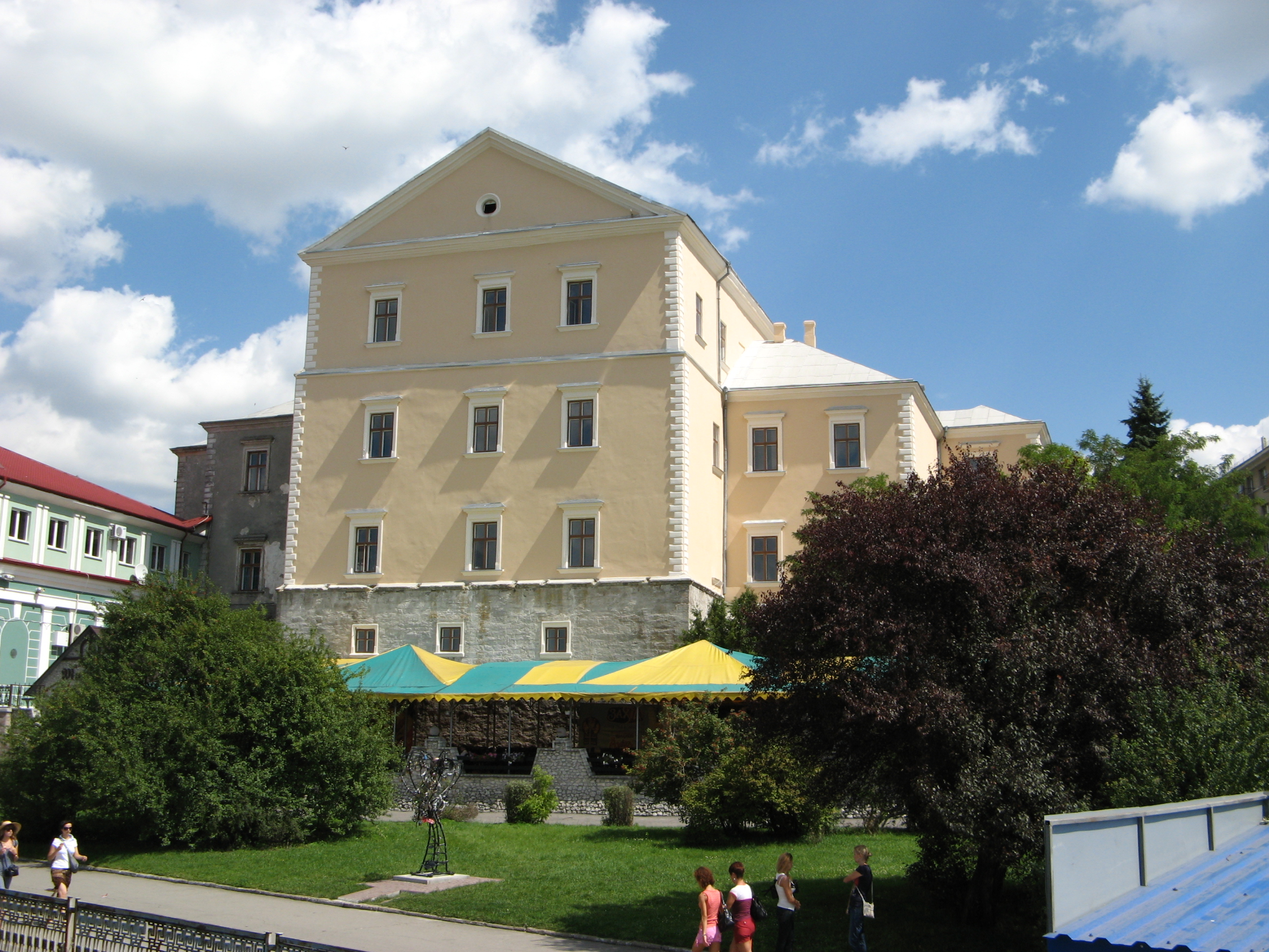 Тернопільський замок (2011)